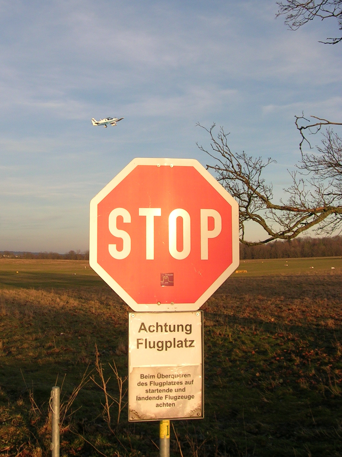 Flugplatz Eichstätt: Stoppschild, denn der Eichstätter Rundwanderweg 1 kreuzt die Startbahn